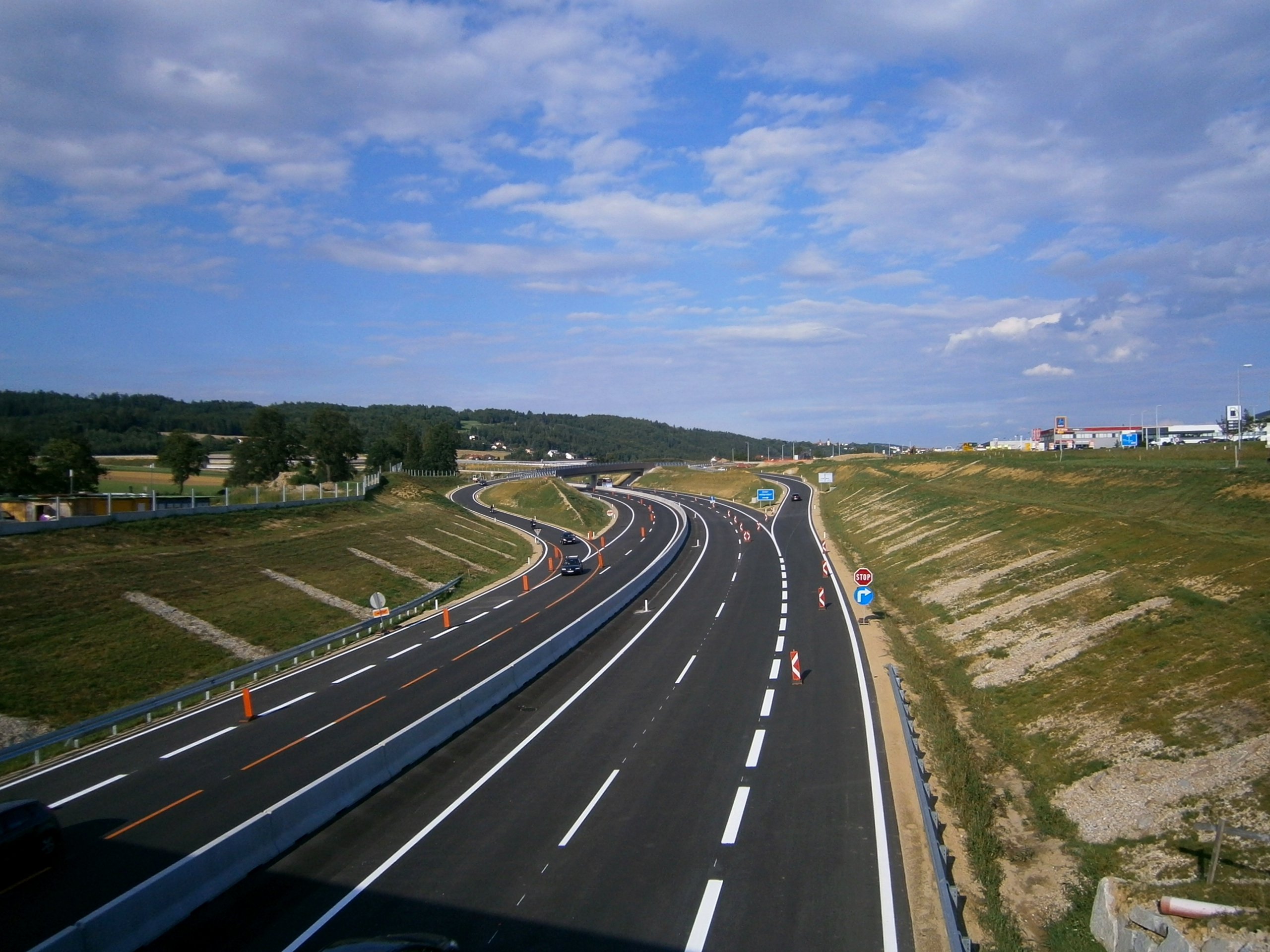 Der freigegebene Abschnitt 1 der S10 bei der Anschlussstelle Unterweitersdorf wenige Tage nach der Eröffnung